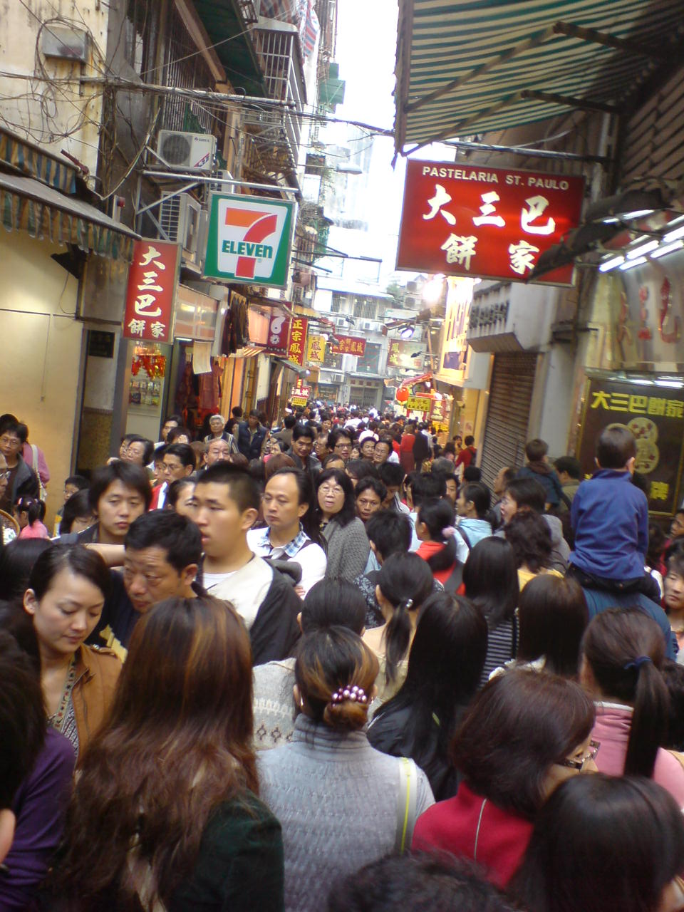 中文（香港）: 農曆新年遊人濟得水泄不通